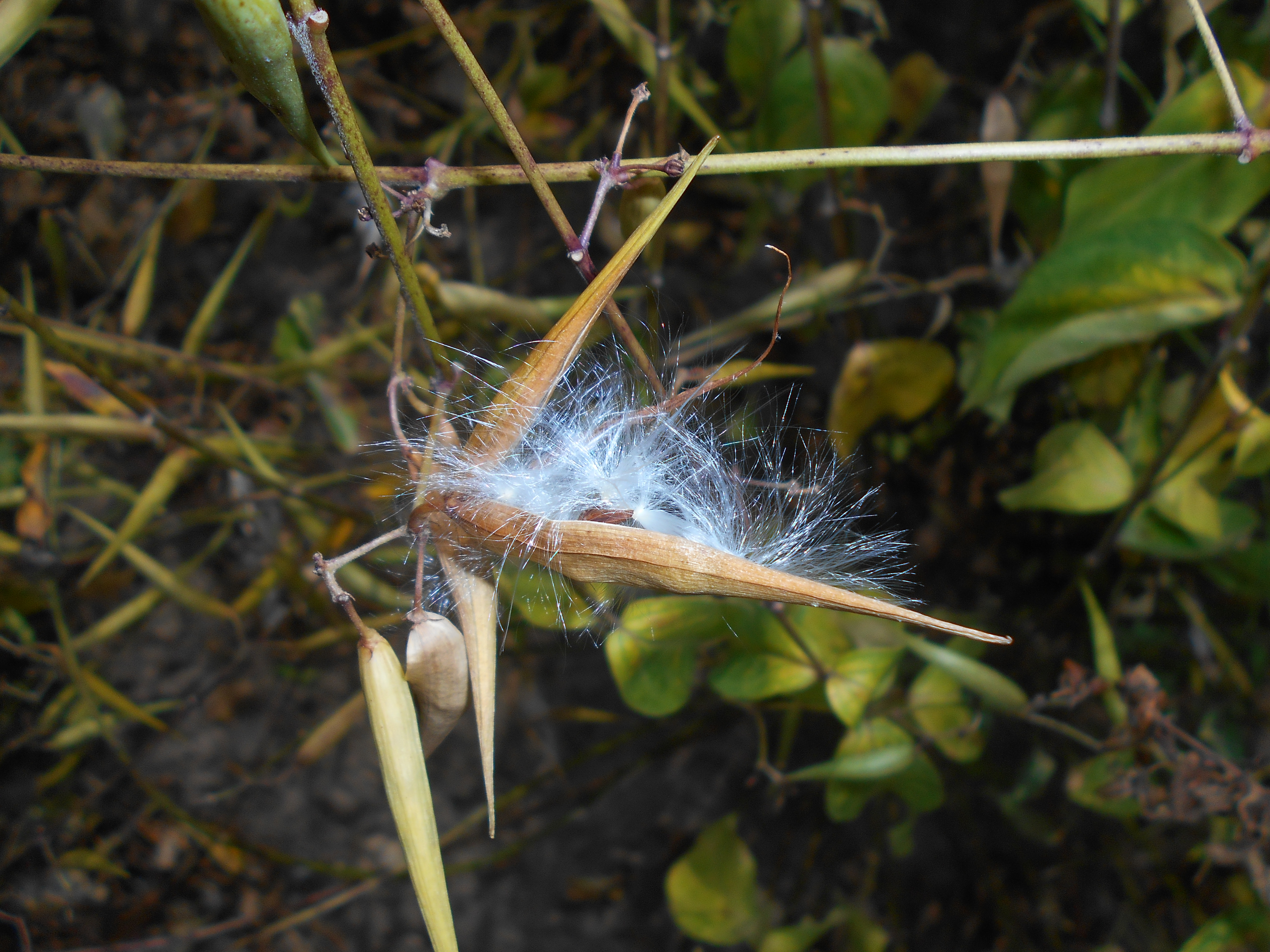 Ciemiężyk czarny (Vincetoxicum nigrum), Ogród Botaniczny UMCS w Lublinie